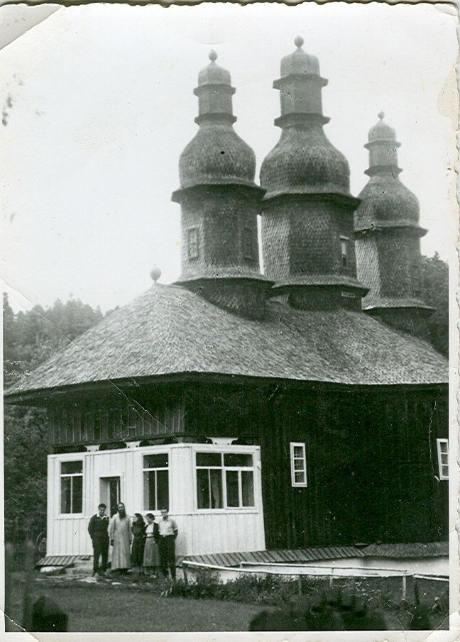 Parintele Vasile Vasilache in iulie 1955 la Schitul Pocrov, Neamț 01